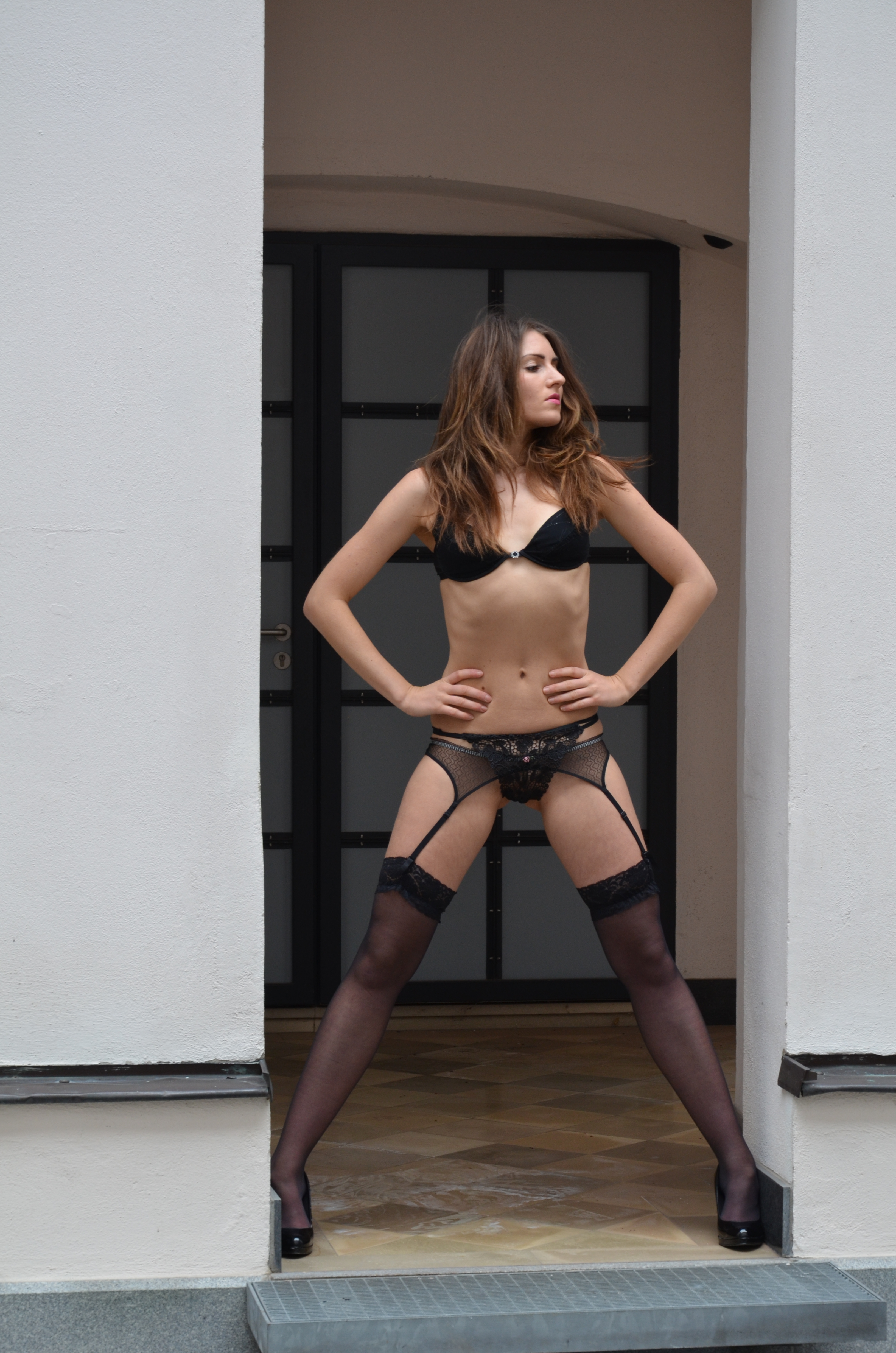 Nürnberg, 10. Wikipedia-Fotoworkshop, Aktstudien